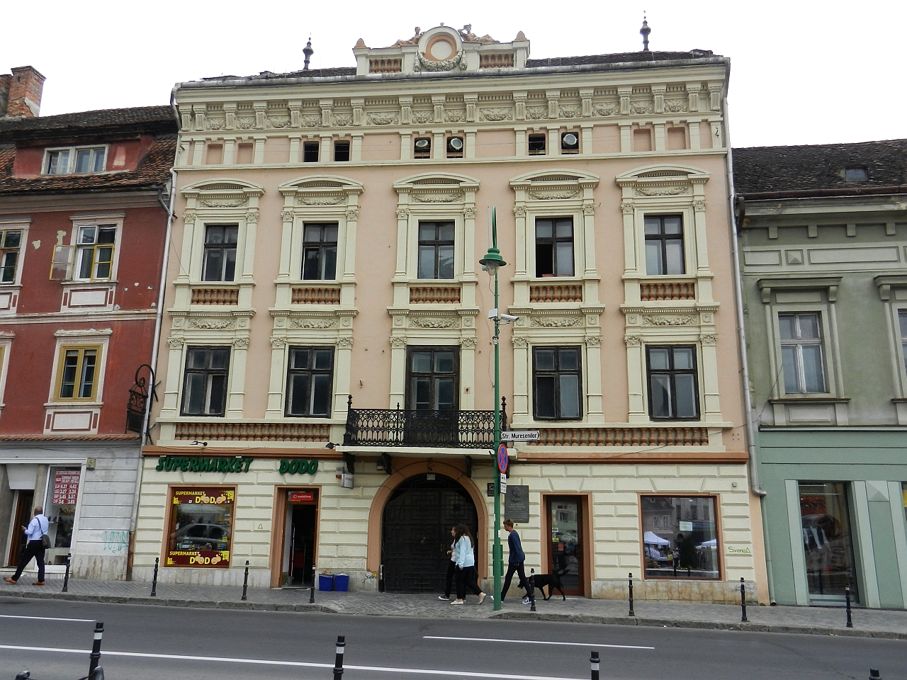 Palatul Safrano